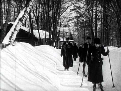 Зимние прогулки на лыжах в Петровском парке. Кадры из фильма "Москва под снегом", 1908 год.